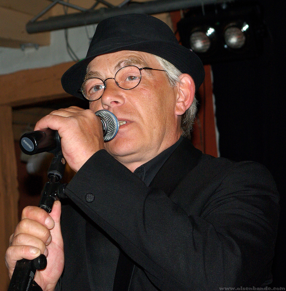 Jes Holtsø während eines Konzerts in Greifswald am 11.5.2013.